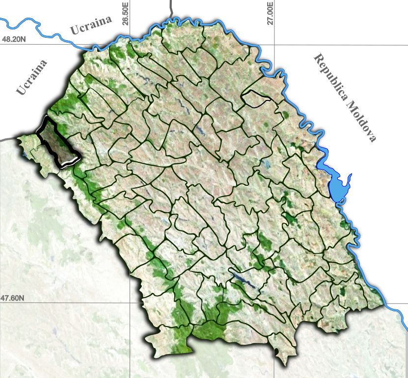 Dersca jud Botosani.